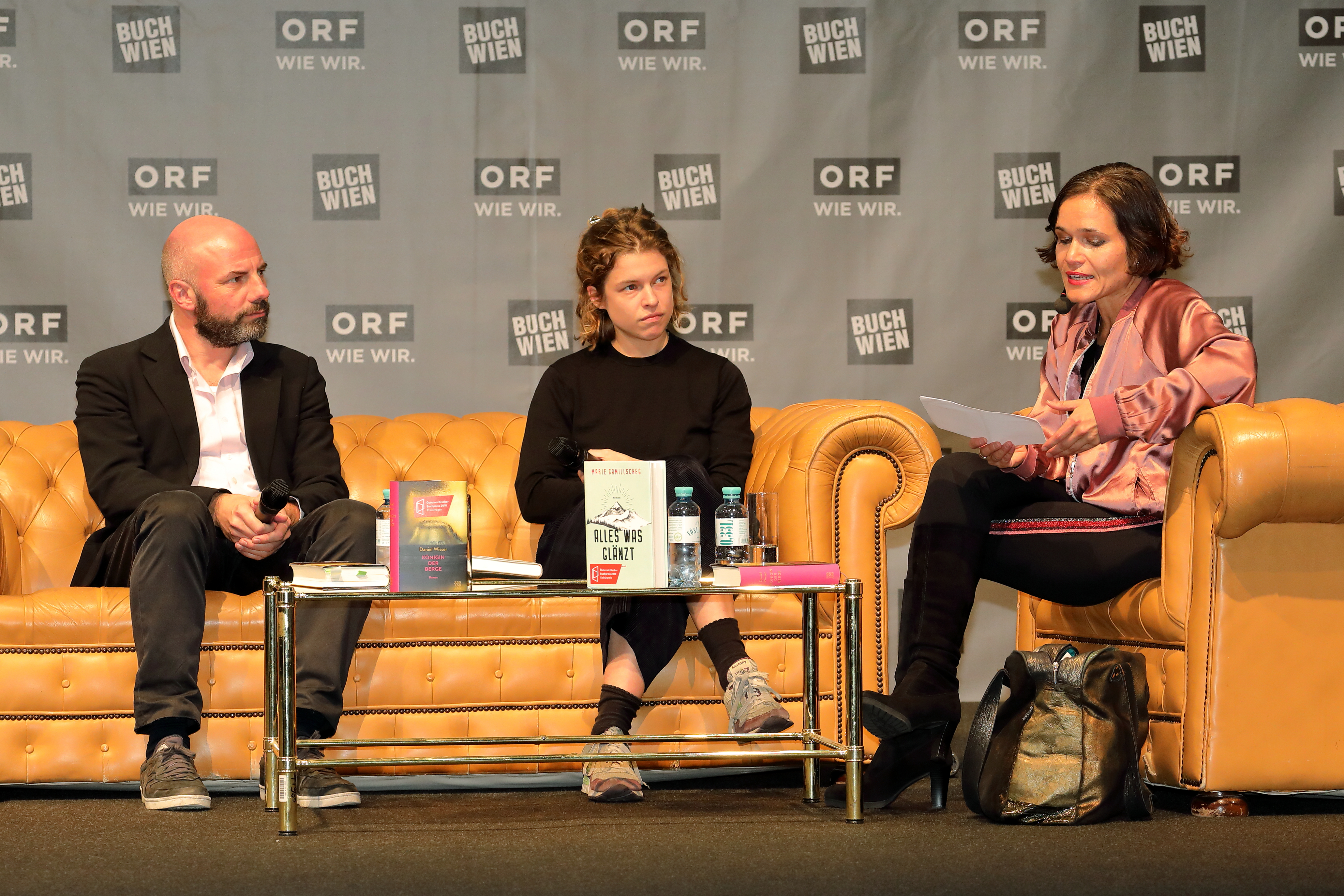 Der Gewinner des Österreichischen Buchpreises 2018 Daniel Wisser und die Gewinnerin in der Kategorie Debüt Marie Gamillscheg mit der Moderatorin Katja Gasser auf der ORF-Bühne der Wiener Buchmesse 2018.